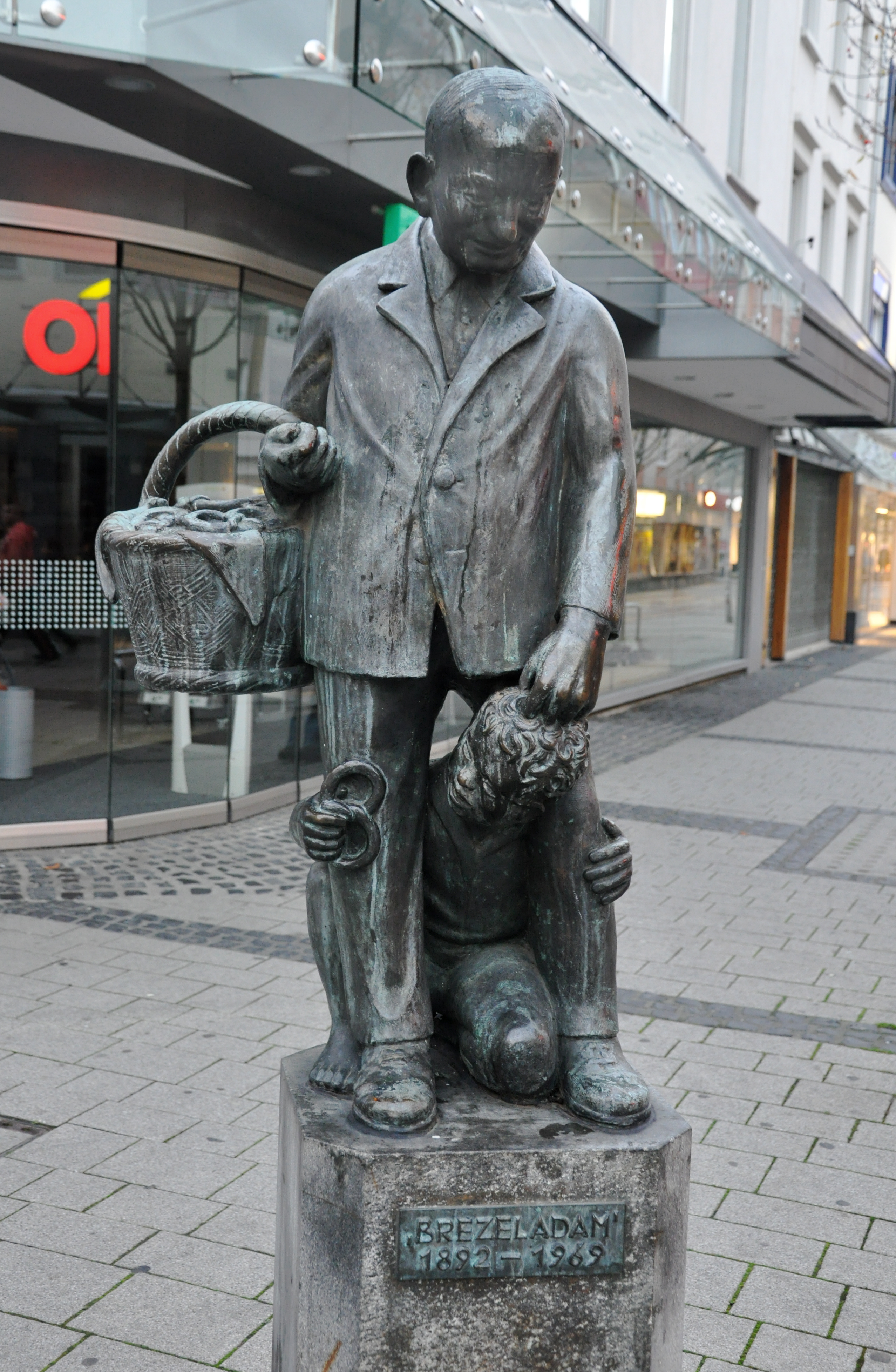 Kaiserslautern, Statue "Brezeladam" von Werner Bernd, 1977, Ecke Eisenbahn- und Marktstraße (erinnert an den Brezelverkäufer Adam, ein Stadtoriginal)